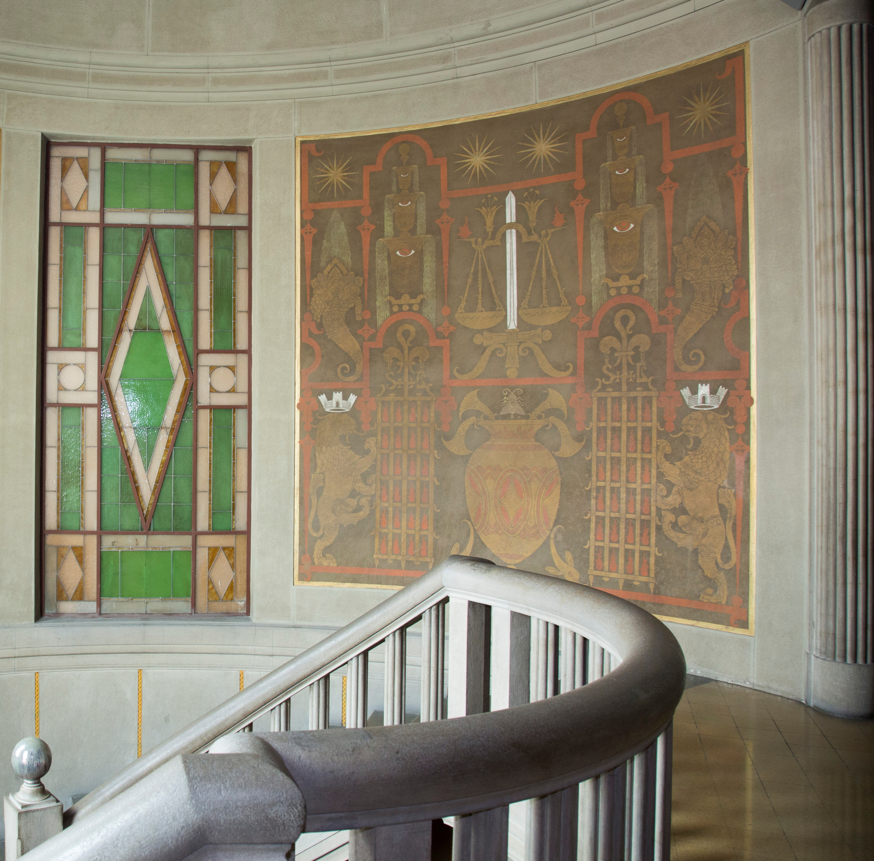 Tito Chini Affreschi e vetrate vano scale del palazzo comunale di Borgo San Lorenzo